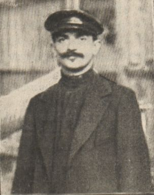 Portrait du mécanicien français Georges Saché mort dans la catastrophe du dirigeable Pax à Paris.